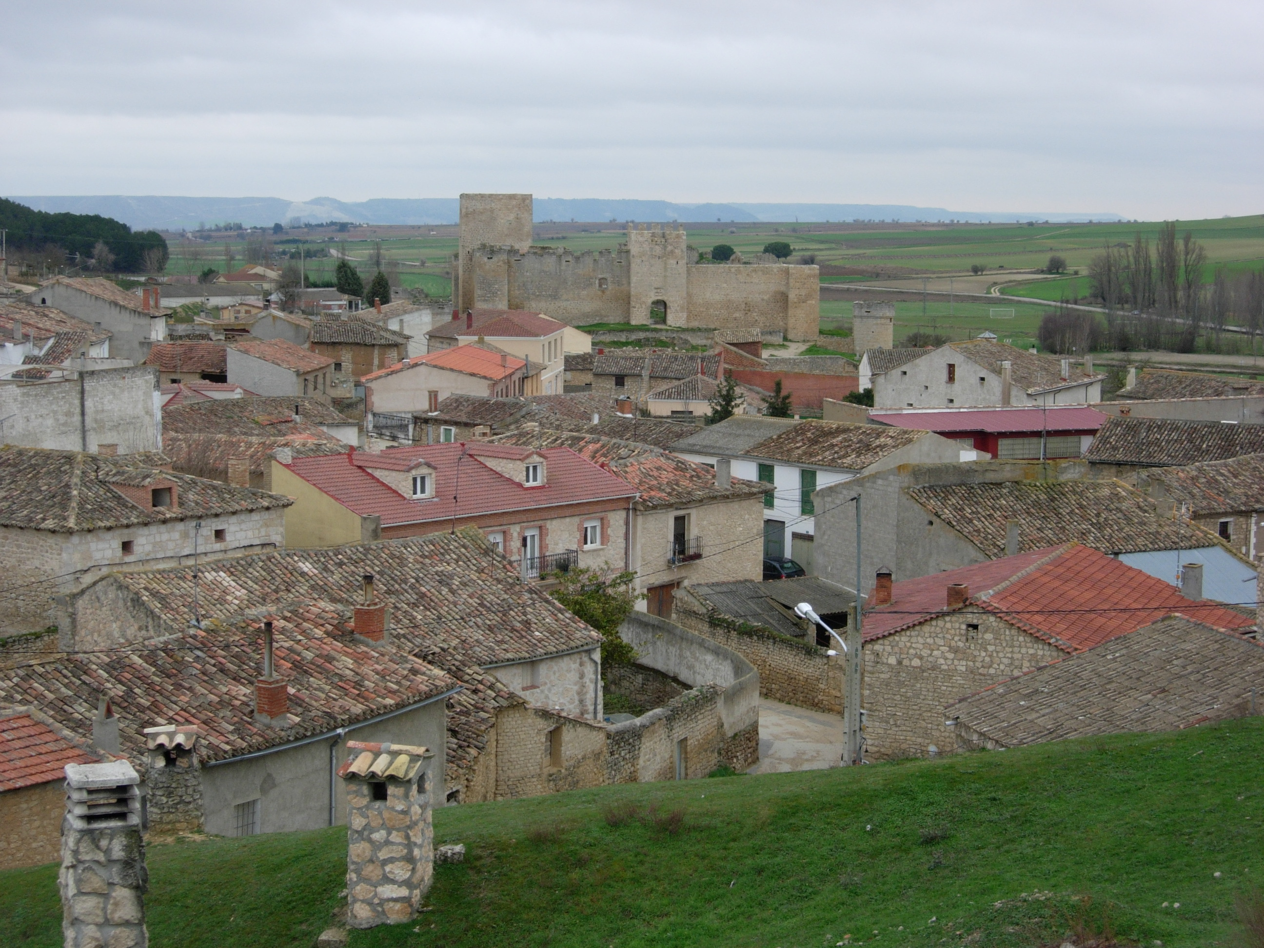 Trigueros del Valle